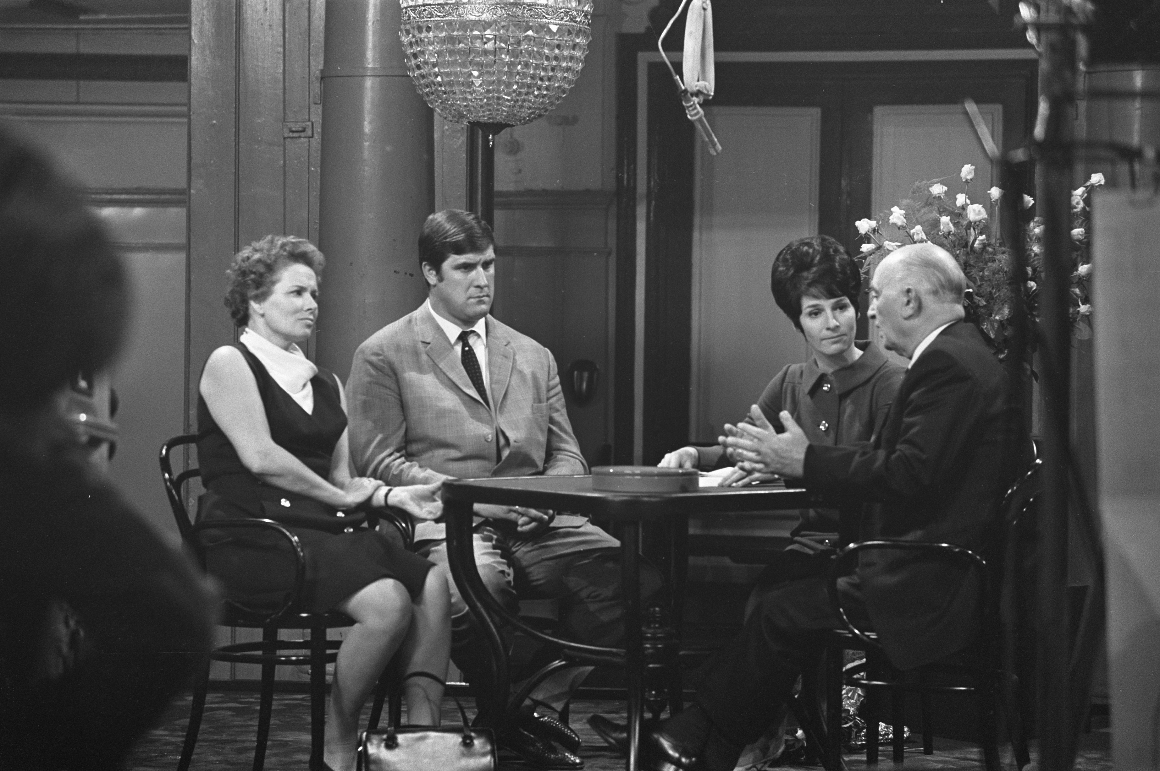 Collectie / Archief : Fotocollectie Anefo Reportage / Serie : [ onbekend ] Beschrijving : Mies en Scène. vlnr mevrouw Van Someren-Downer, Anton Geesink, Mies Bouwman, journalist Kick Geudeker Datum : 25 oktober 1968 Trefwoorden : televisieprogramma's Persoonsnaam : Bouwman, Mies, Geesink, Anton, Someren-Downer, Haya van Fotograaf : Nijs, Jac. de / Anefo, [onbekend] Auteursrechthebbende : Nationaal Archief Materiaalsoort : Negatief (zwart/wit) Nummer archiefinventaris : bekijk toegang 2.24.01.05 Bestanddeelnummer : 921-7952